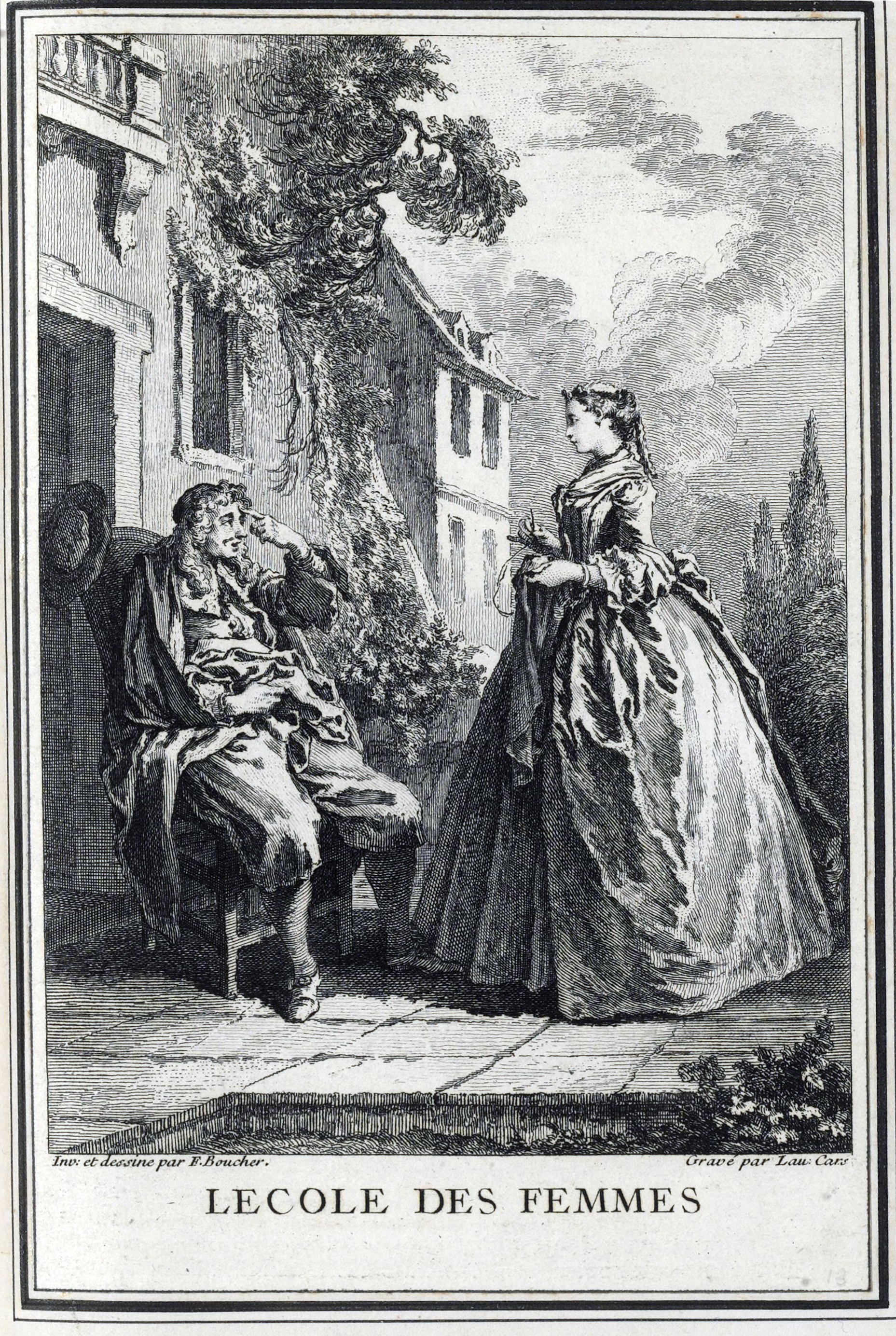 Dessin de Boucher pour illustrer la pièce de Molière.